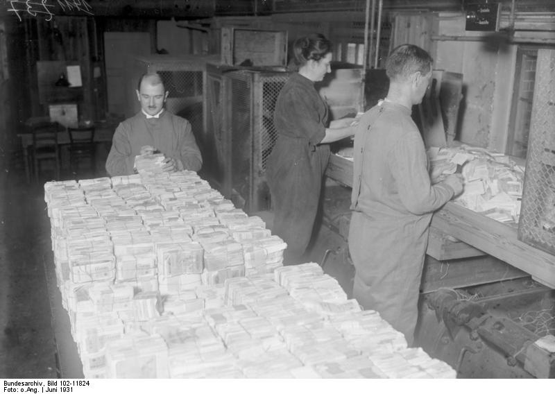 Banknoten werden vernichtet! Die Deutsche Reichsbank lässt von Zeit zu Zeit alte abgegriffene und beschädigte deutsche Banknoten einziehen und in ihrer Banknoten-Vernichtungsanstalt vernichten. Ehe das aus dem Verkehr gezogene Papiergeld zur Vernichtungsstelle gelangt, wird es von Beamten der Reichsbank genau registriert und dann in die Zerschneidemaschine geworfen. Die vernichteten Banknoten werden zur Herstellung anderen Papiers weiter verwendet. Beamte der Reichsbank werfen das Geld in die Schneidemaschine. Man beachte den Anzug der Beamten, welcher auf dem Rücken geschlossen wird und vollständig taschenlos ist.